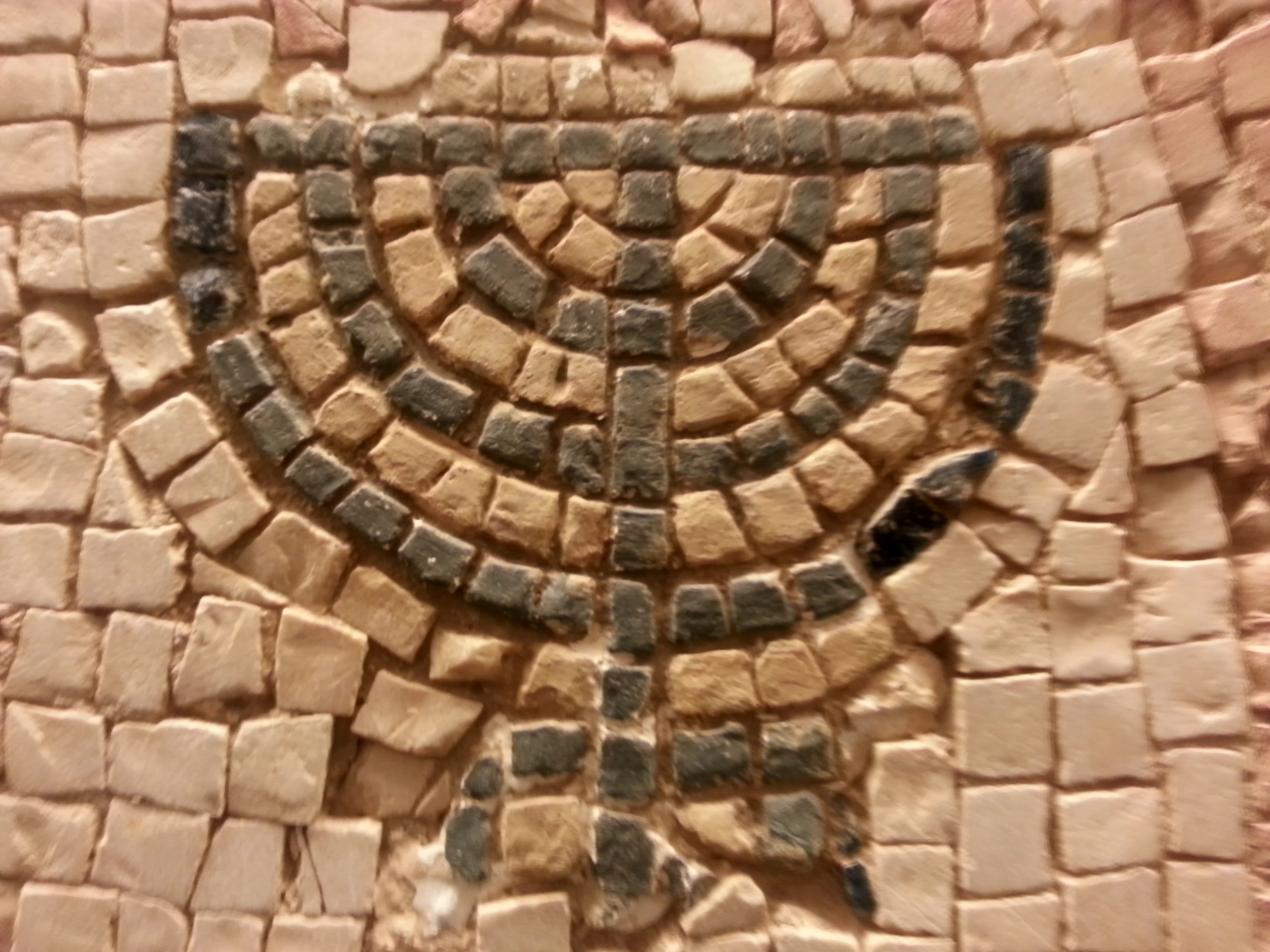 פרט 1 - פסיפס יהודי בבית שאן; מוצג במוזאון ישראל בירושלים